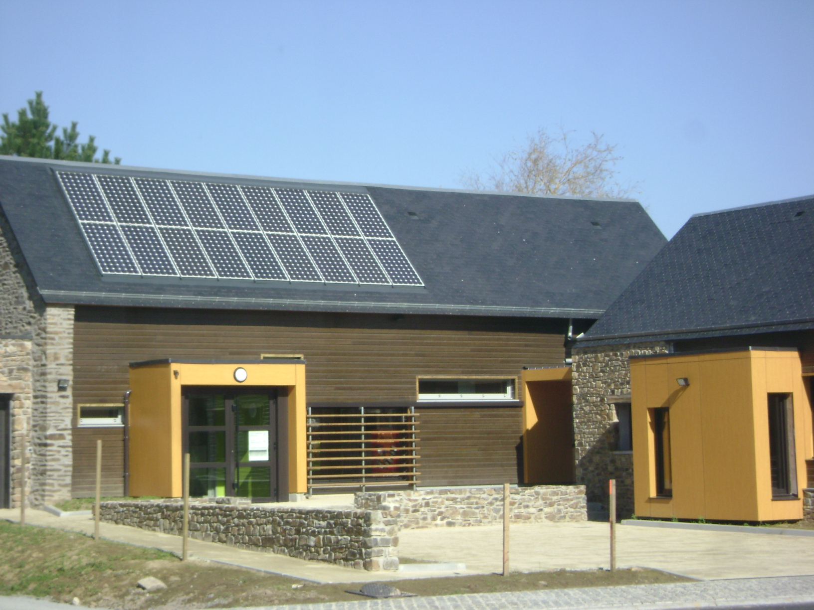 Centre de valorisation du Patrimoine Culturel Immatériel à Parcé (Bretagne)